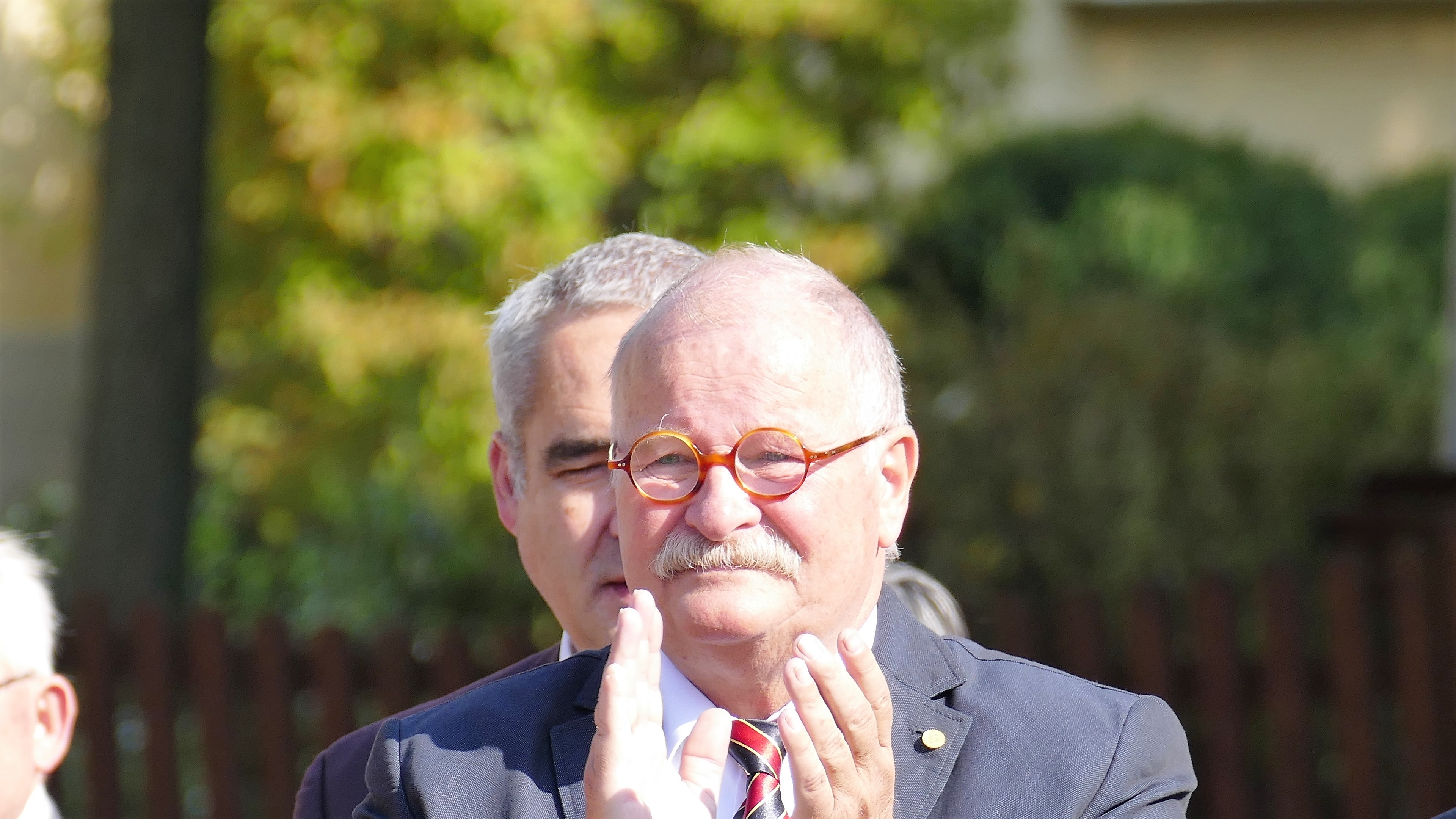 Der ehemalige Landtagsabgeordnete Herbert Müller (SPD) anlässlich der Einweihung des Platzes der Deutschen Einheit in Memmingen